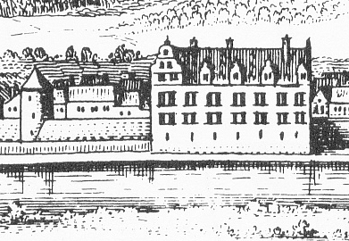 Merian-Stich aus dem Jahr 1647, zeigt das frühe Hessisch Oldendorf. Quelle: gescannt aus "Hessisch Oldendorf 750 Jahre" v. 1983. Auch als Motiv auf Wandtellern etc. zu finden.